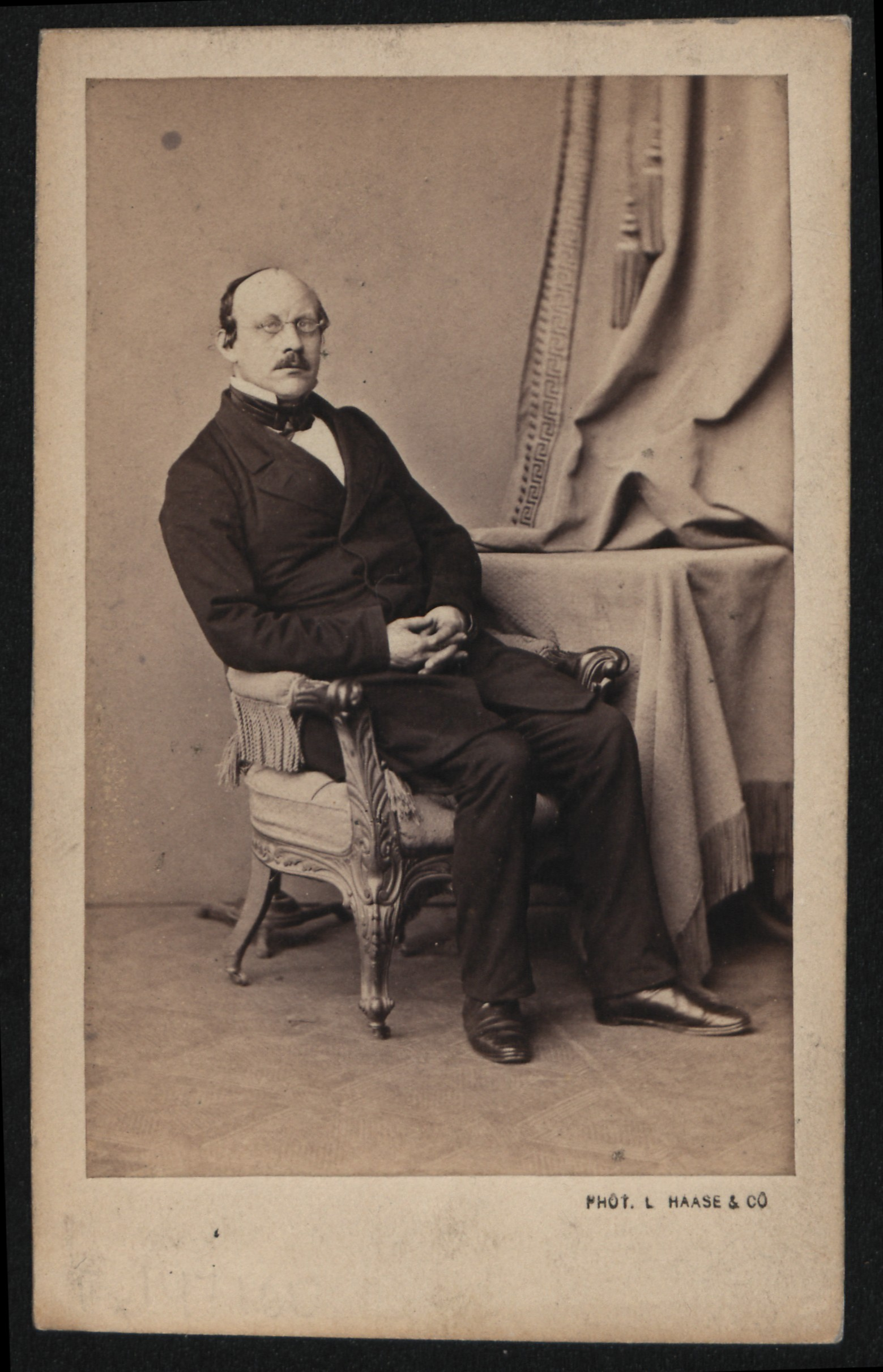 Rudolf von Gneist, [ca 1870]